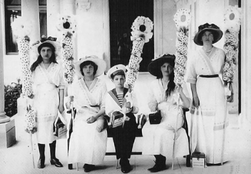 Дети Николая II в День Белого цветка